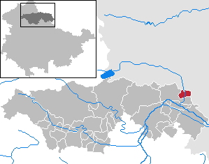 Mönchpfiffel-Nikolausrieth in Thuringia - Kyffhäuserkreis